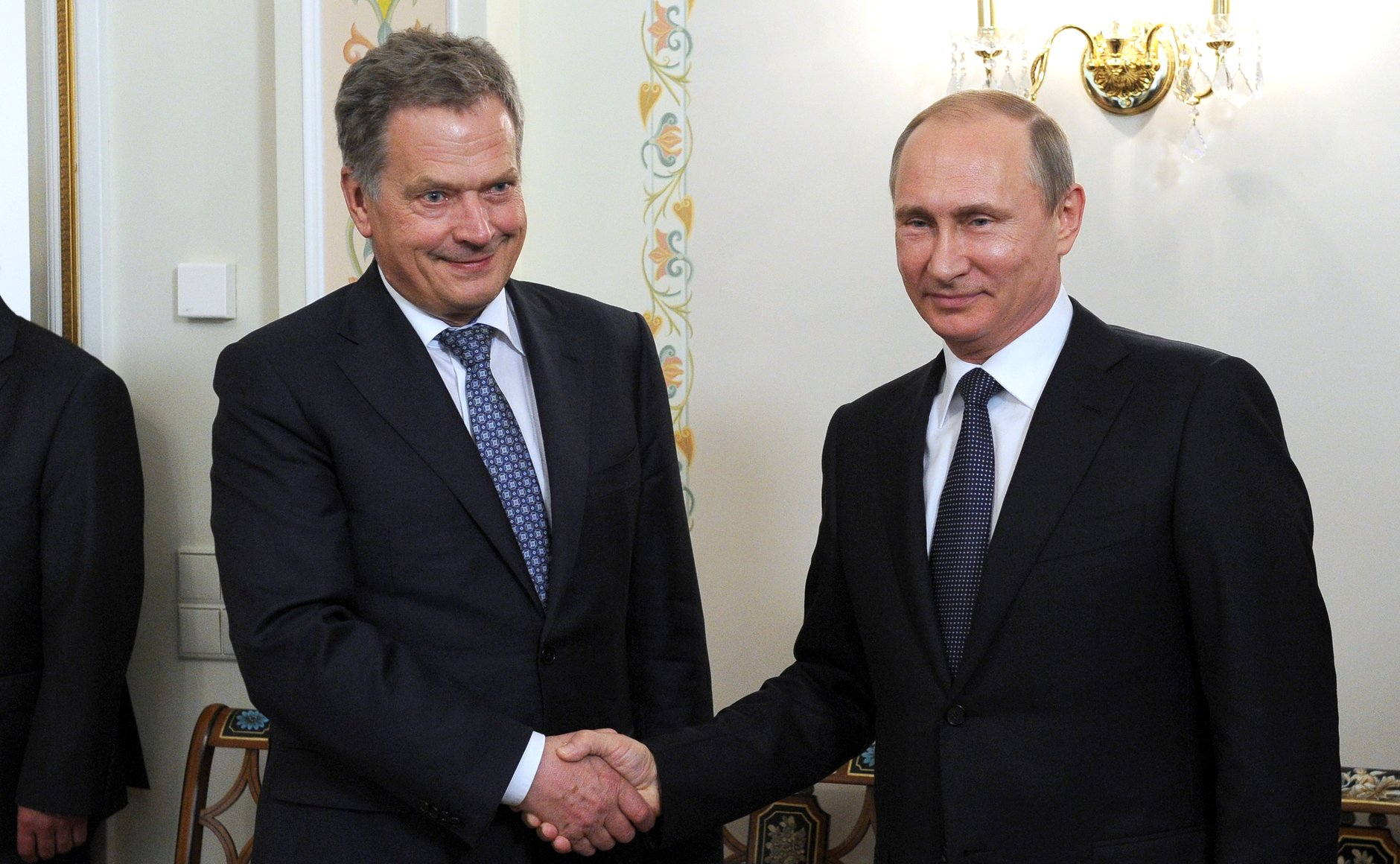 Владимир Путин с Президентом Финляндии Саули Ниинистё